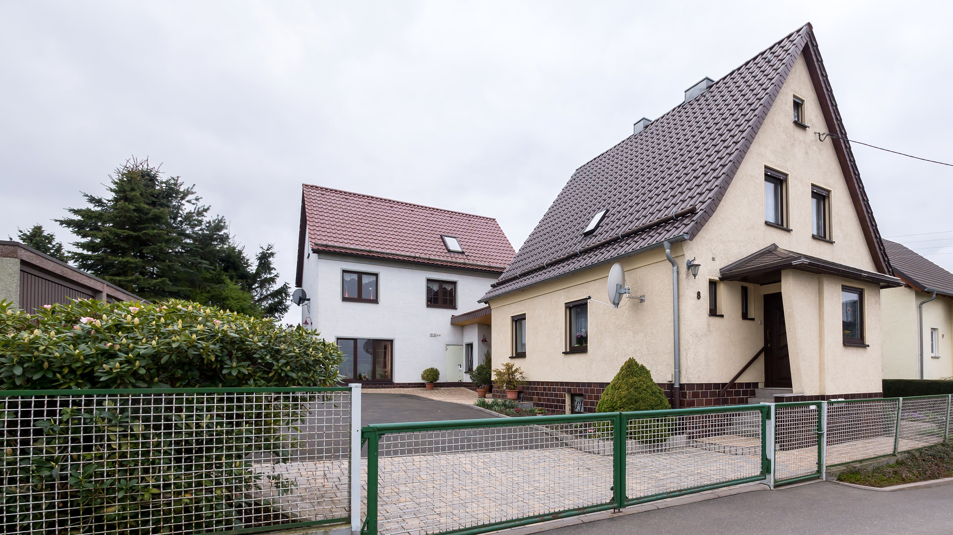 Arnsgereuth Ortsstraße 8 I